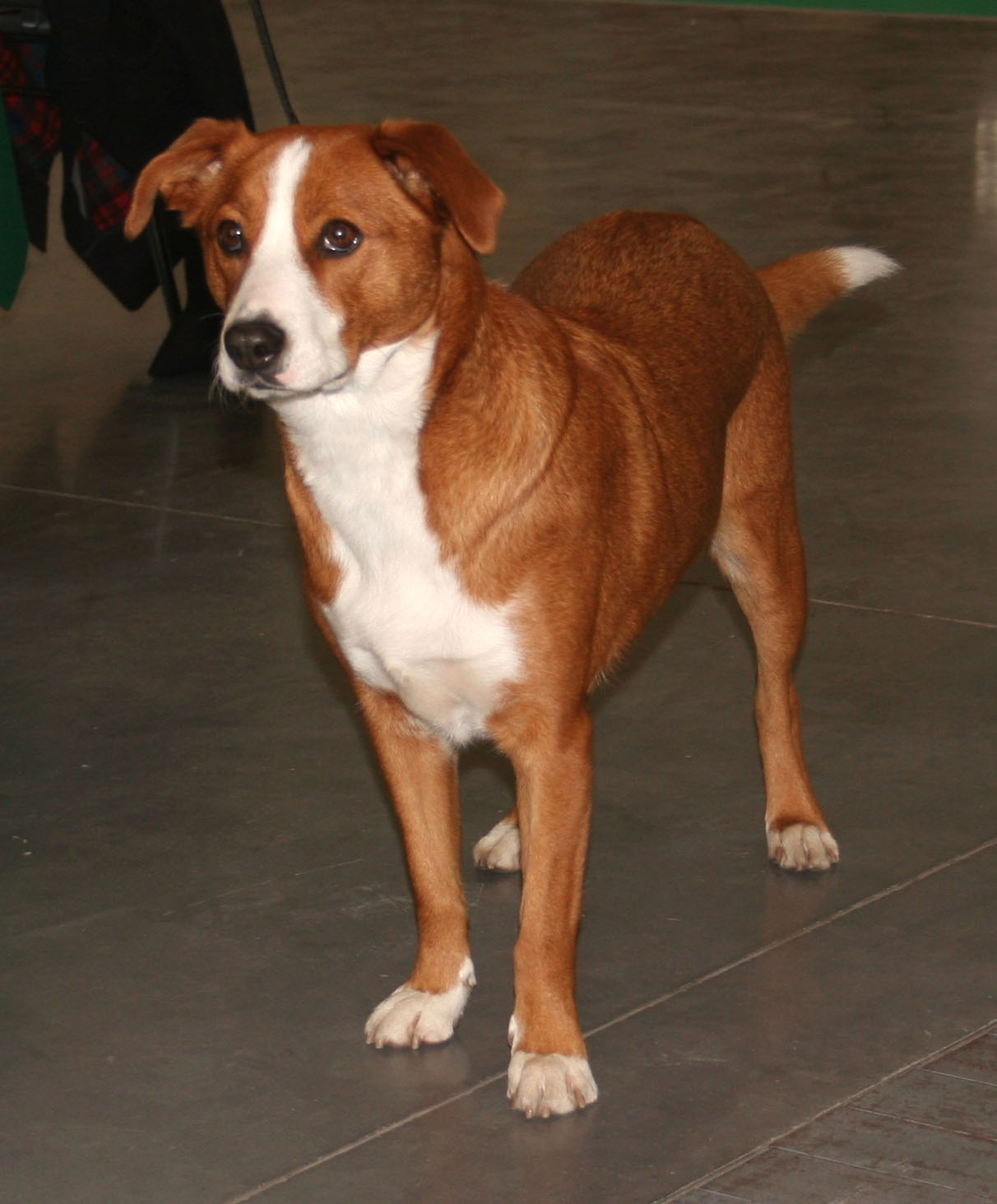 Pinczer_austriacki na Światowej Wystawie Psów Rasowych w Poznaniu